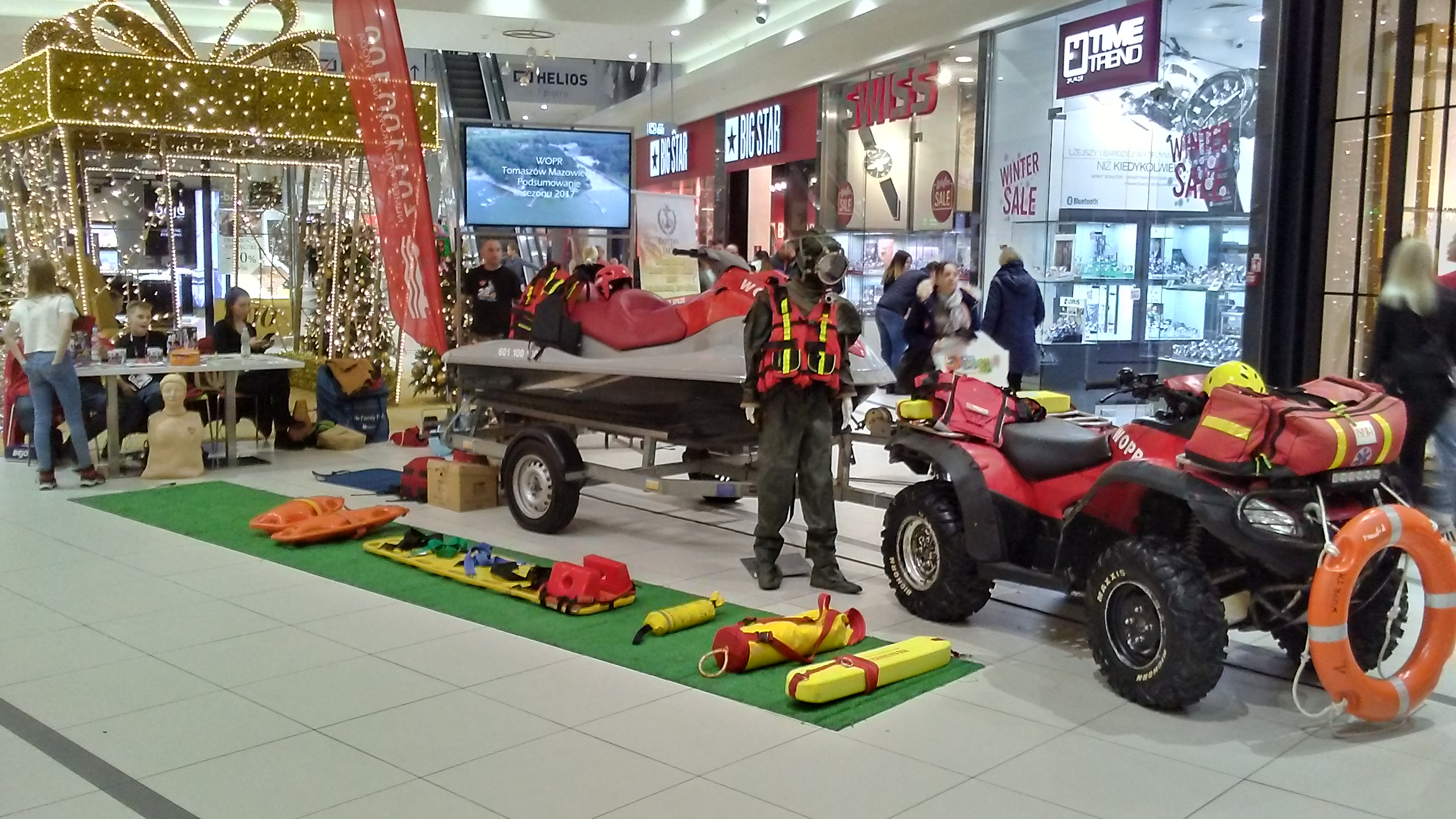 Wodne Ochotnicze Pogotowie Ratunkowe w Tomaszowie Mazowieckim, prezentacja sprzętu podczas kwesty charytatywnej WOŚP w 2020 roku